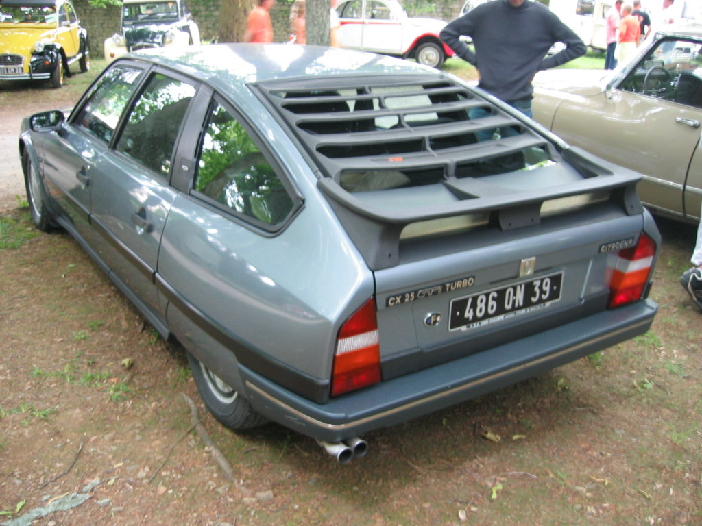 Citroen CX